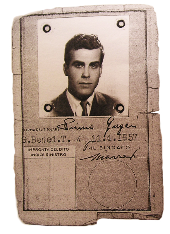 Primo Gregori